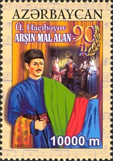 Markanın ön planında azərbaycanın qədim parça satıcısı (Arşın Mal Alan), arxa planında isə bu musiqişli komediyanın süjeti təsvir olunmuşdur. Marka dahi bəstəkar Üzeyir Hacıbəyovun yazdığı musiqili komediyanın 90 illiyinə həsr olunmuşdur.